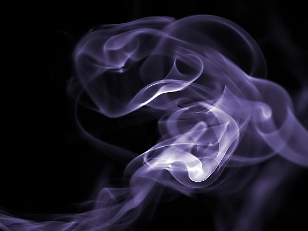 Smoke